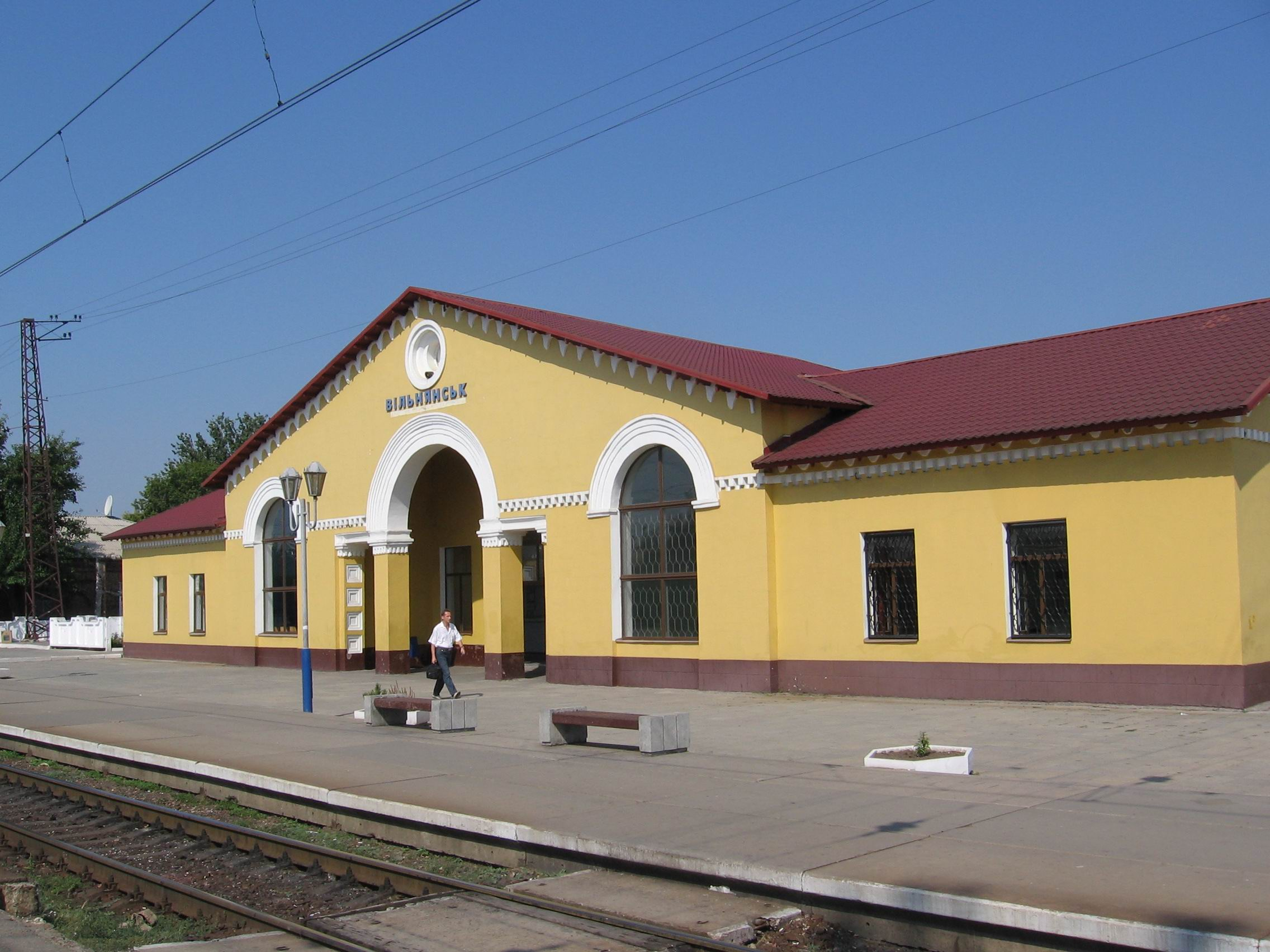 Залізничний вокзал у Вільнянську